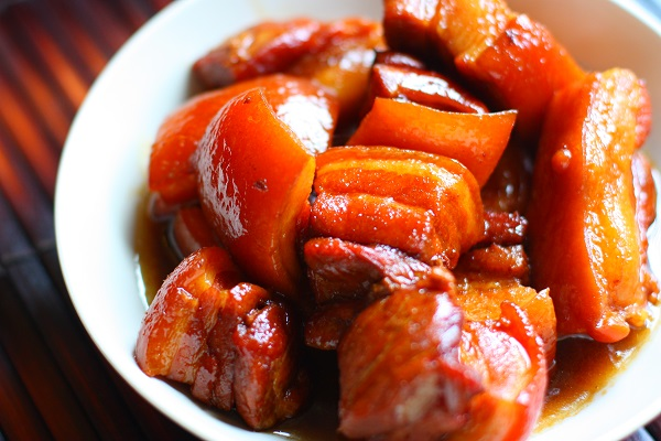 九州の郷土料理 東坡煮